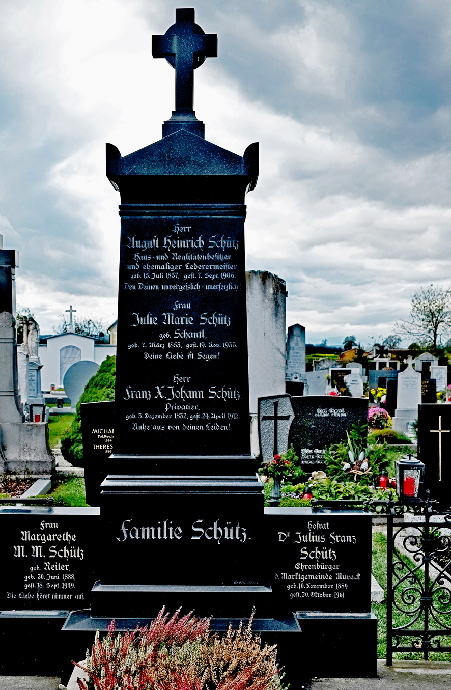 Julius Franz Schütz, Grabmal in Mureck